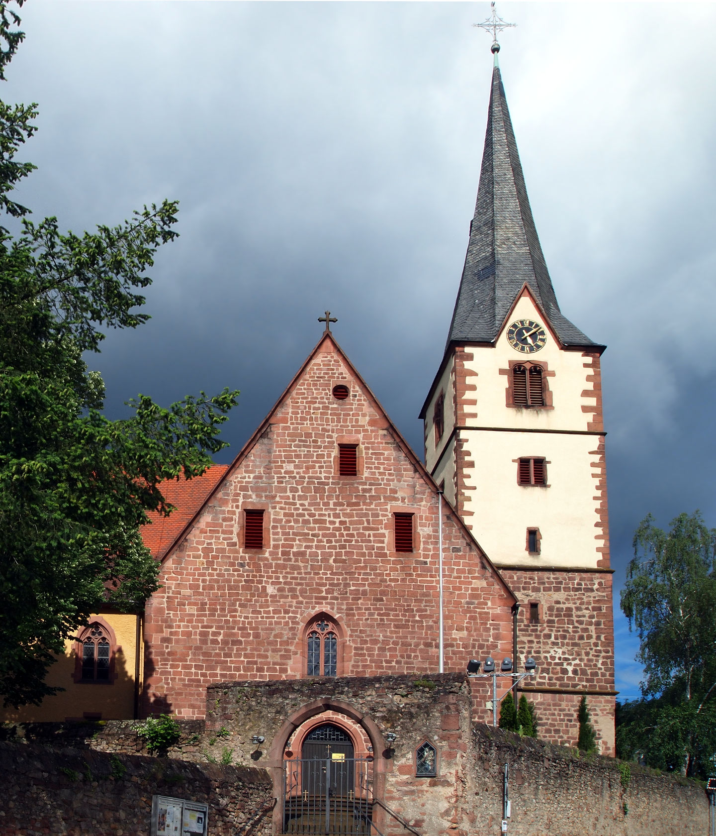 Evangelische Kirche in Dossenheim bei Heidelberg